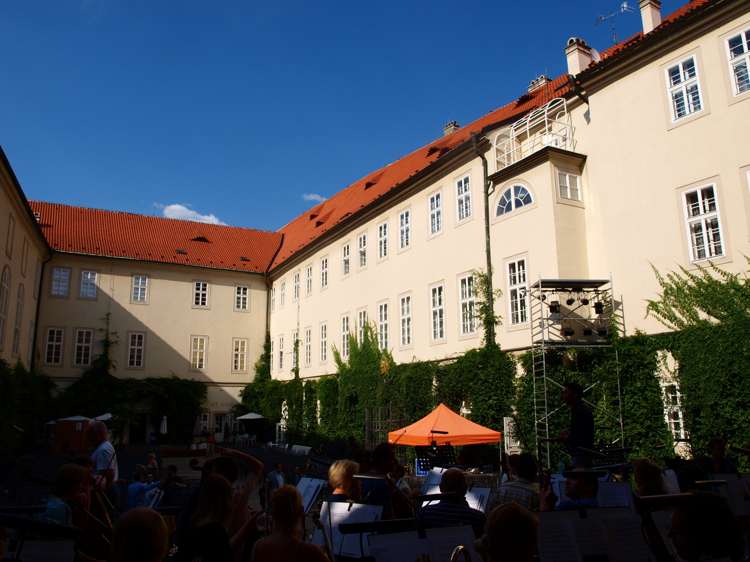 Lichtenštejnský palác na Malostranském náměstí